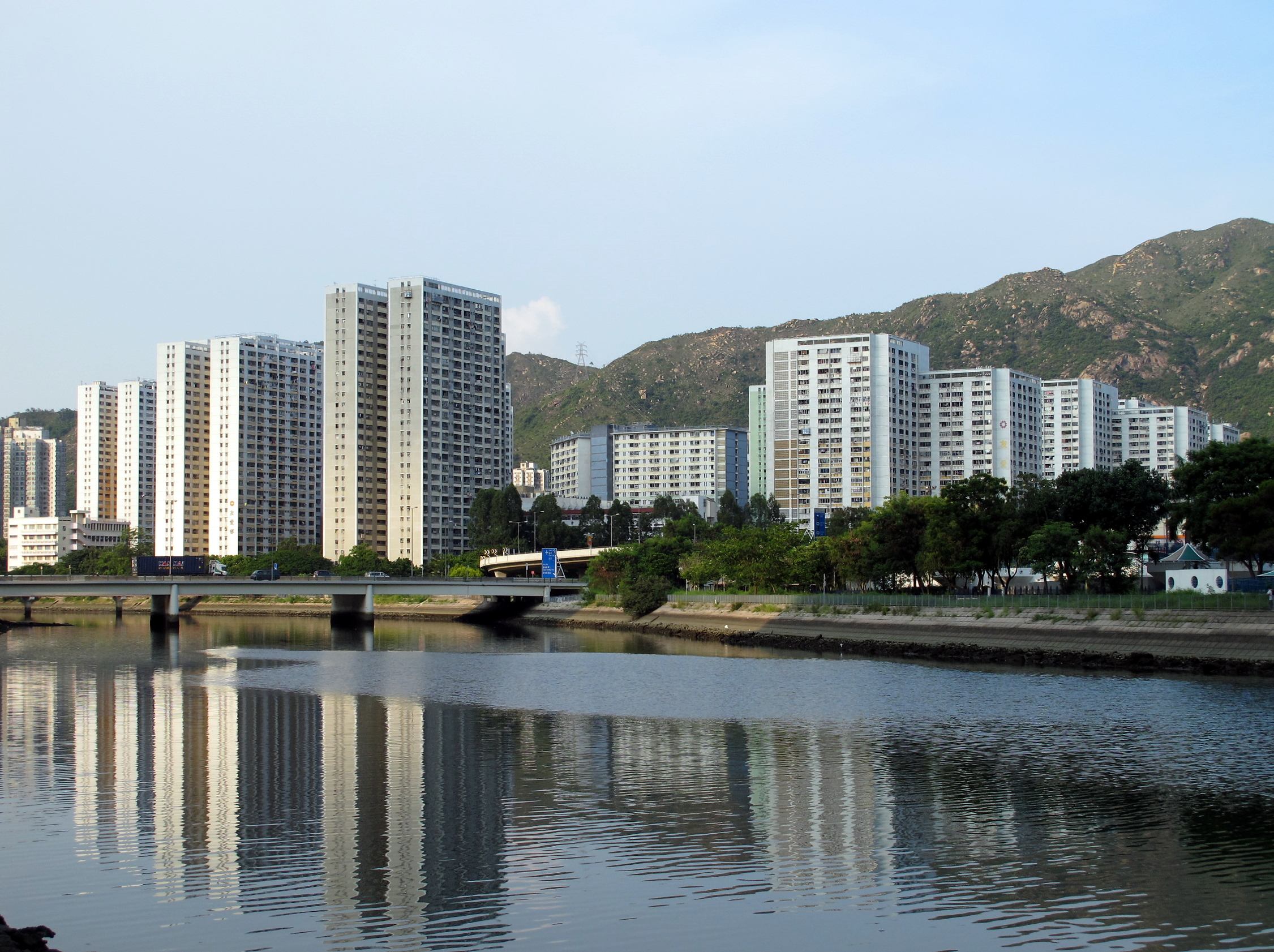 Yau Oi Estate 友愛邨